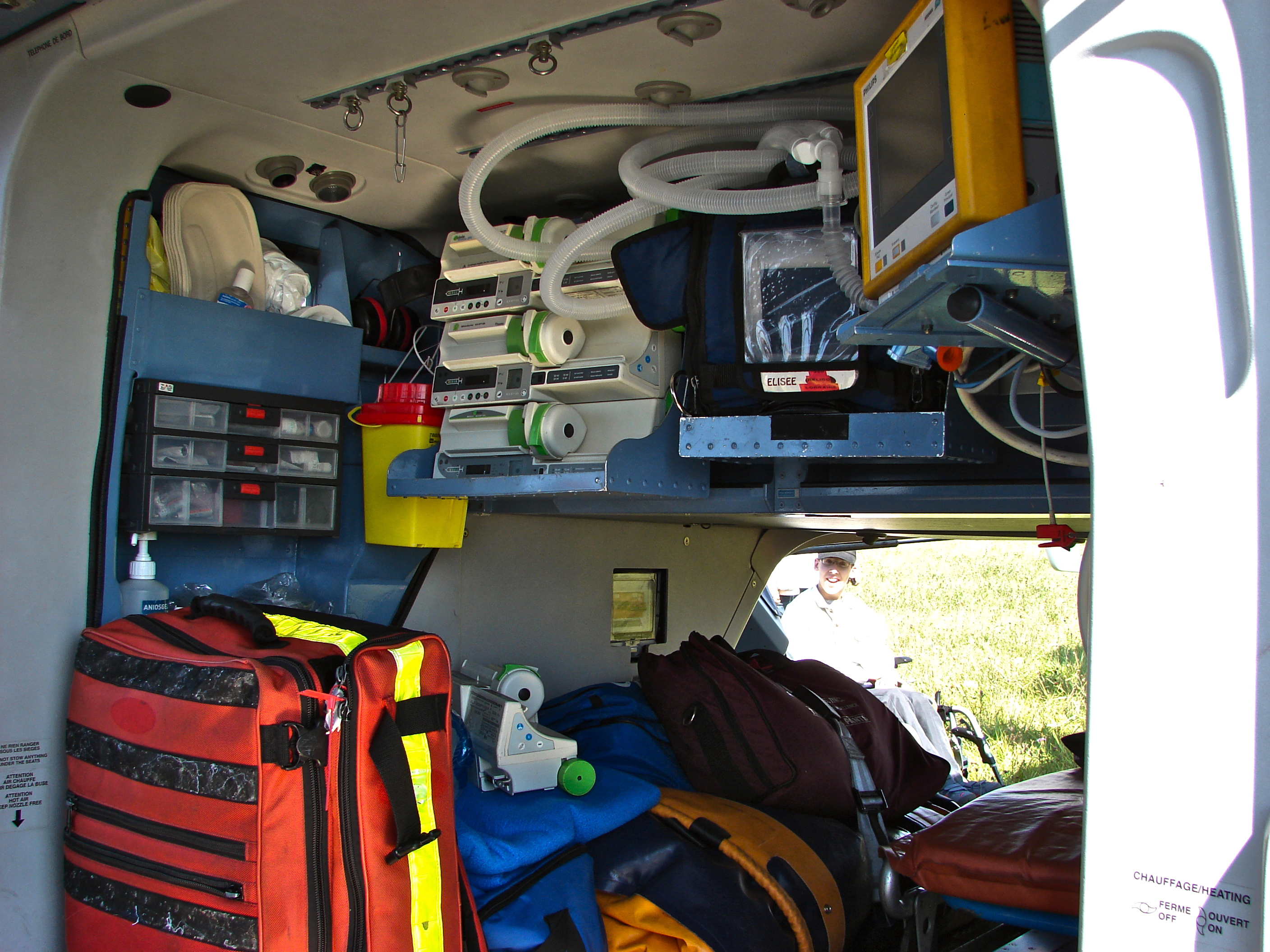 SAMU (Helicopteres de France) F-GNLO (cn 0005) Nancy - Essey (ENC / LFSN)